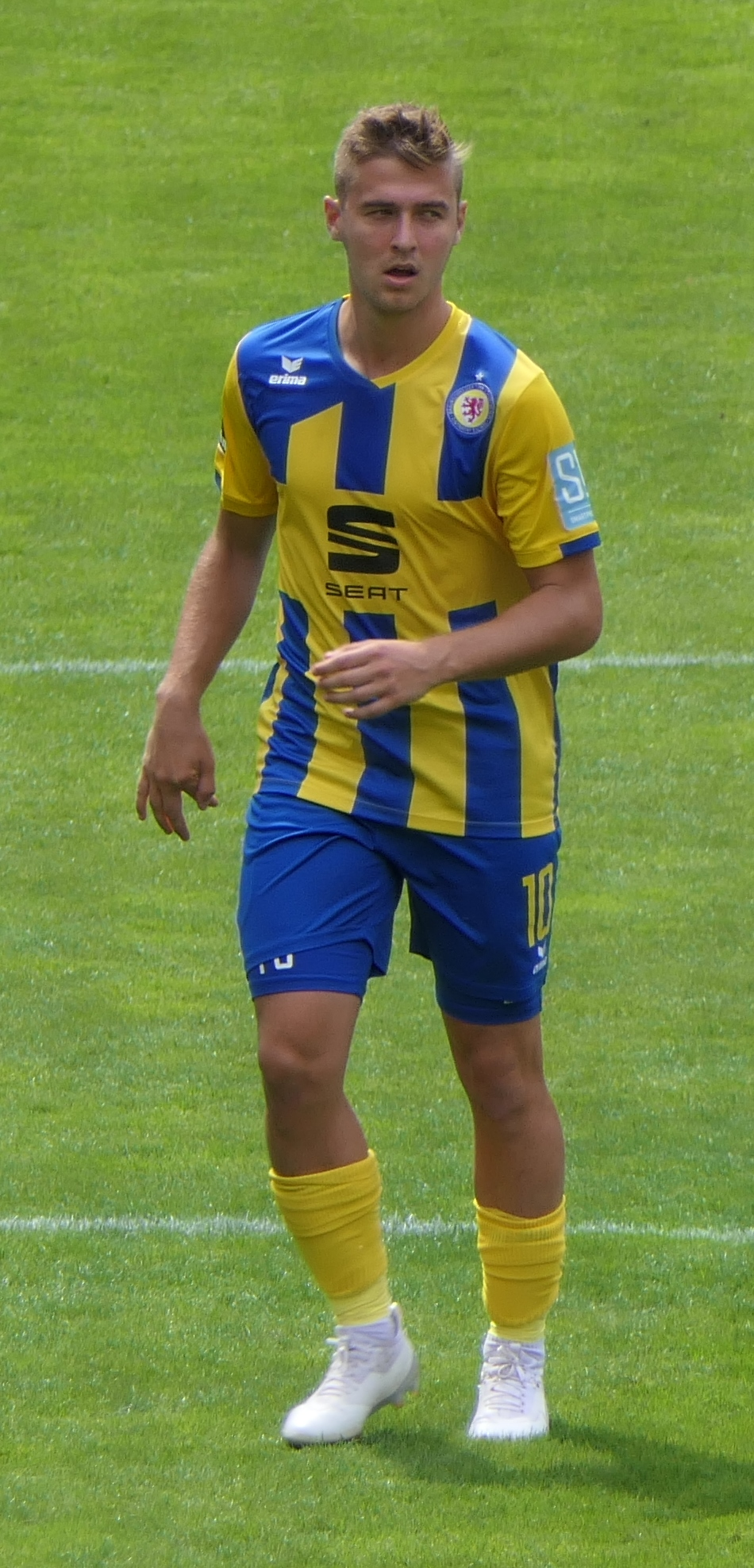 Der Fussballprofi Martin Kobylanski im Trikot von Eintracht Braunschweig beim Auswärtsspiel gegen den 1.FC Kaiserslautern am 18.08.2019.